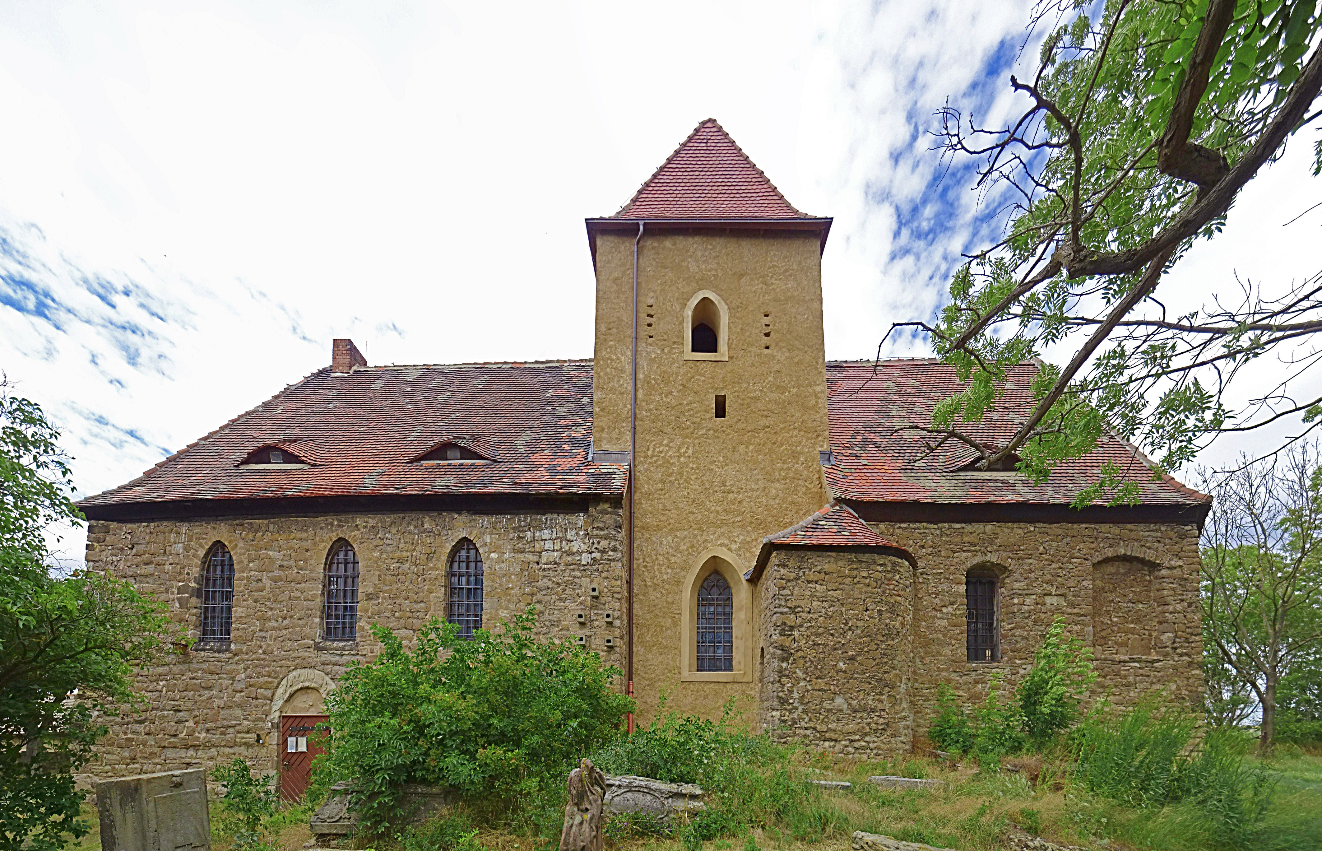 Kirche St. Nikolaus (Seeburg) von Süden